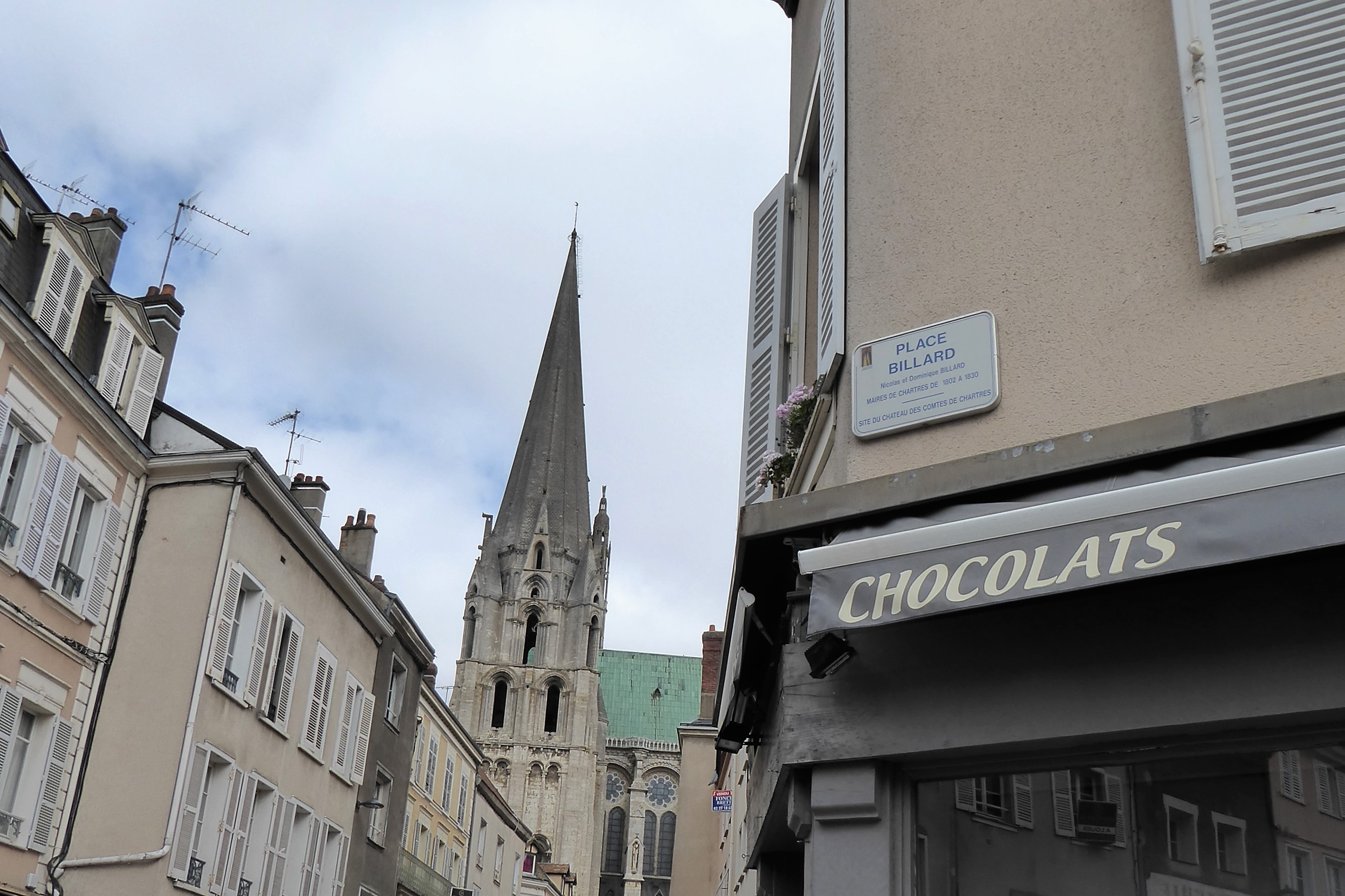 plaque Nicolas et Dominique Billard, place Billard, Chartres, Eure-et-Loir, France. La plaque indique : "Nicolas et Dominique Billard maires de Chartres de 1802 à 1830. Site du château des comtes de Chartres."